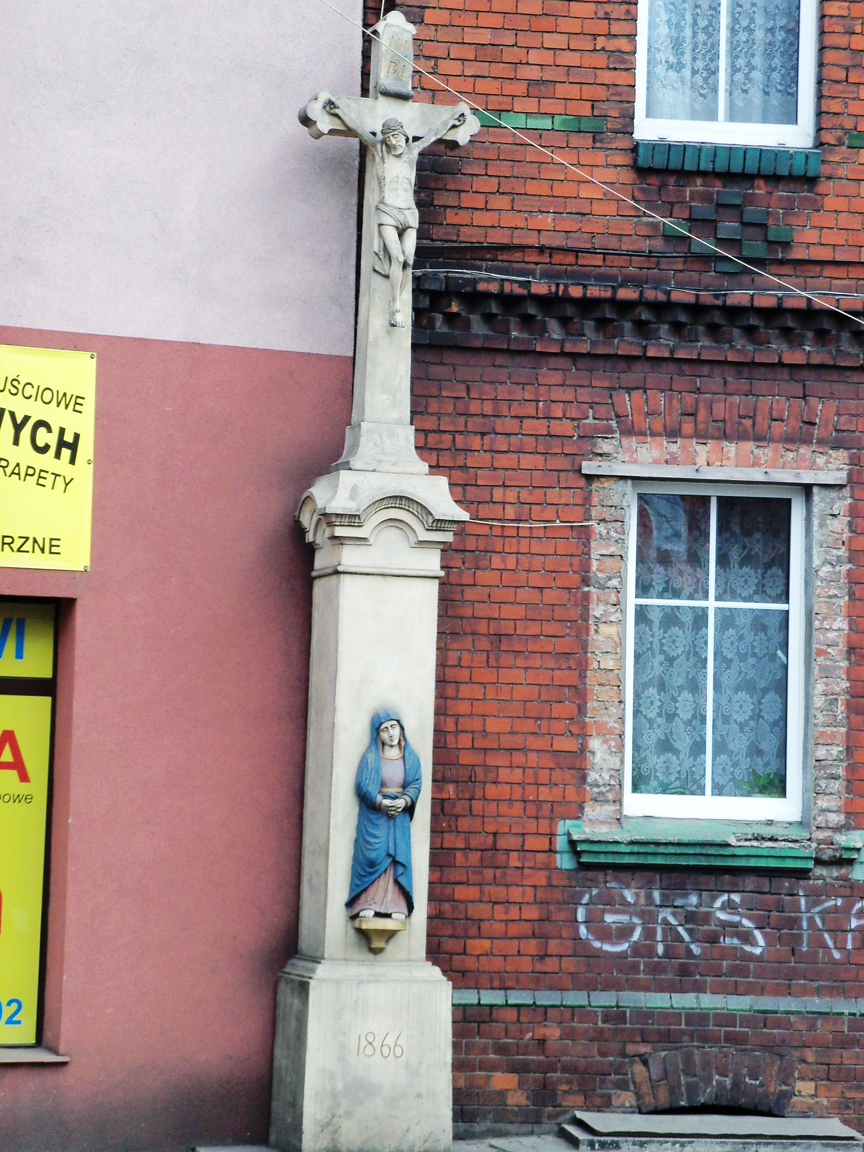 Krzyż z roku 1866 przy ul. Strzelców Bytomskich 14, 16 w Katowicach-Dąbrówce Małej